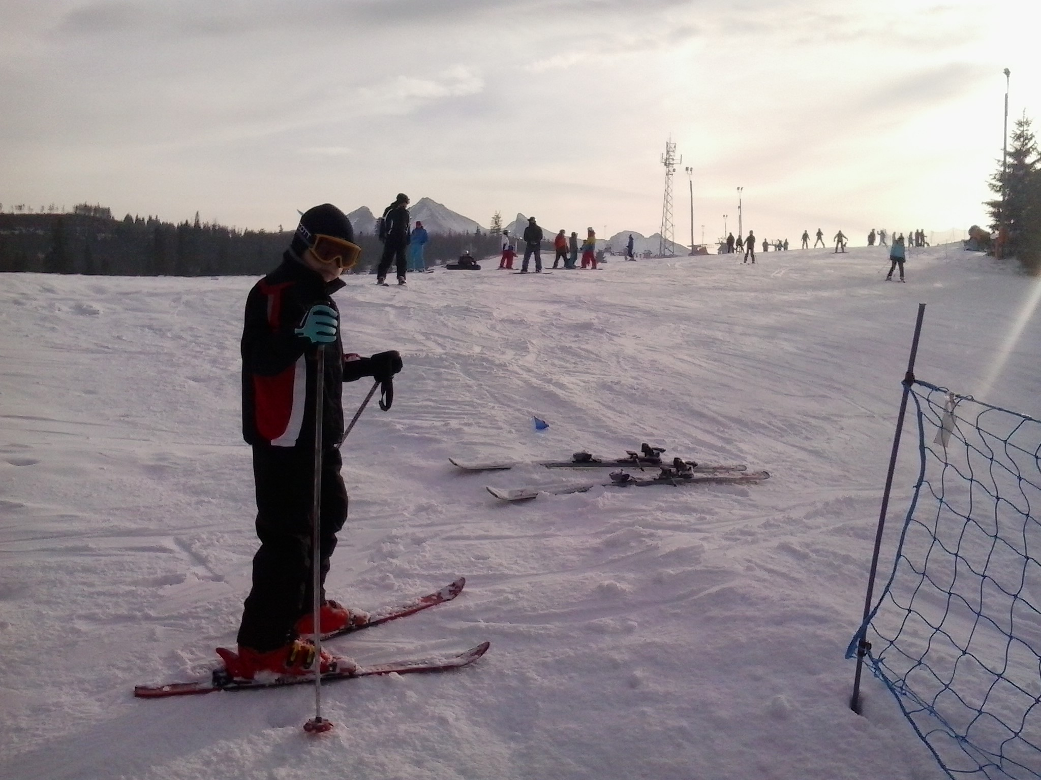 Gmina Bukowina Tatrzańska, Poland